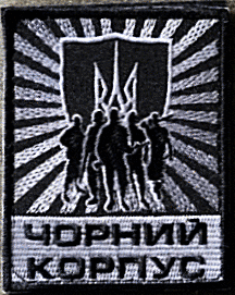 Неофіційна емблема корпусу «чорних чоловічків» батальйону «Азов», офіційна назва якого - «Чорний Корпус». На даний момент офіційно не використовується.